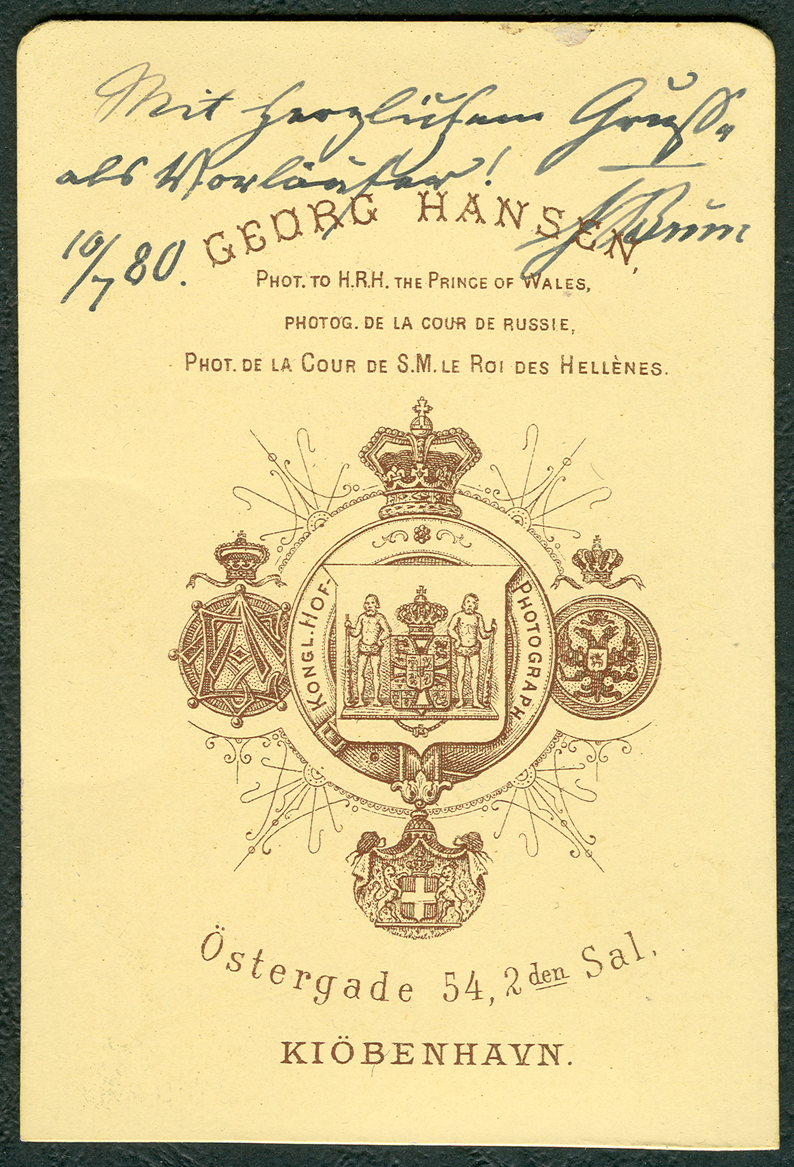 Revers einer Carte de Visite von Georg [Emil] Hansen, die den Fotografen als vierfachen Titel-Träger höchster Adelshöfe ausweist: Als "Königlichen Hof-Photograph" des dänischen Königshauses, "to H. R. H. the Prince of Wales, [...] de la Cour de Russie [... und desjenigen] de S. M. Le Roi des Hellènes". Der umseitig abgebildete Fritz Brun (s. unten) hat sein Visitkartenportrait handschriftlich signiert, datiert und in deutscher Sprache gewidmet "Mit herzlichem Gruß[e?] ...[?]"